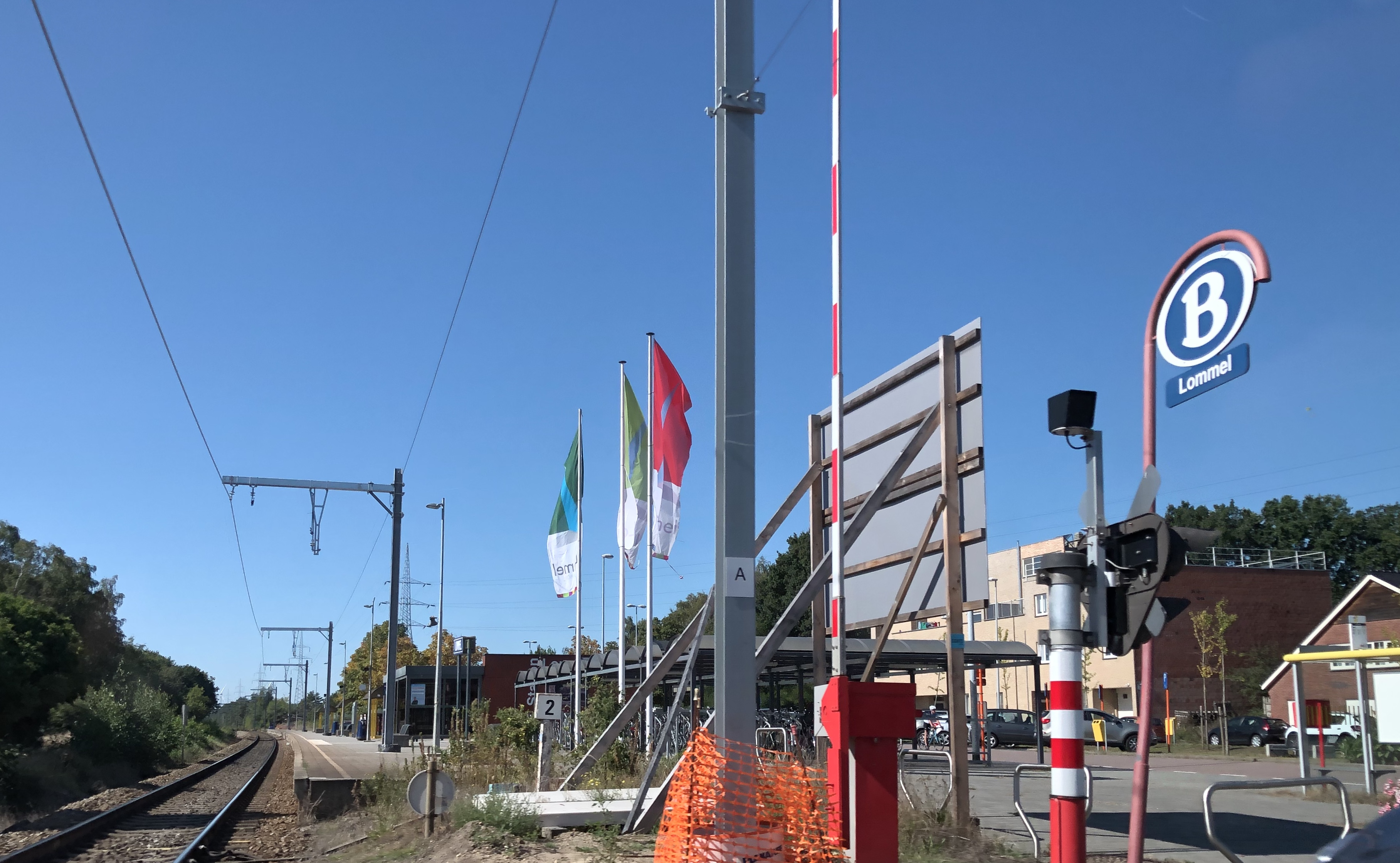 Lommel, België, September 2019